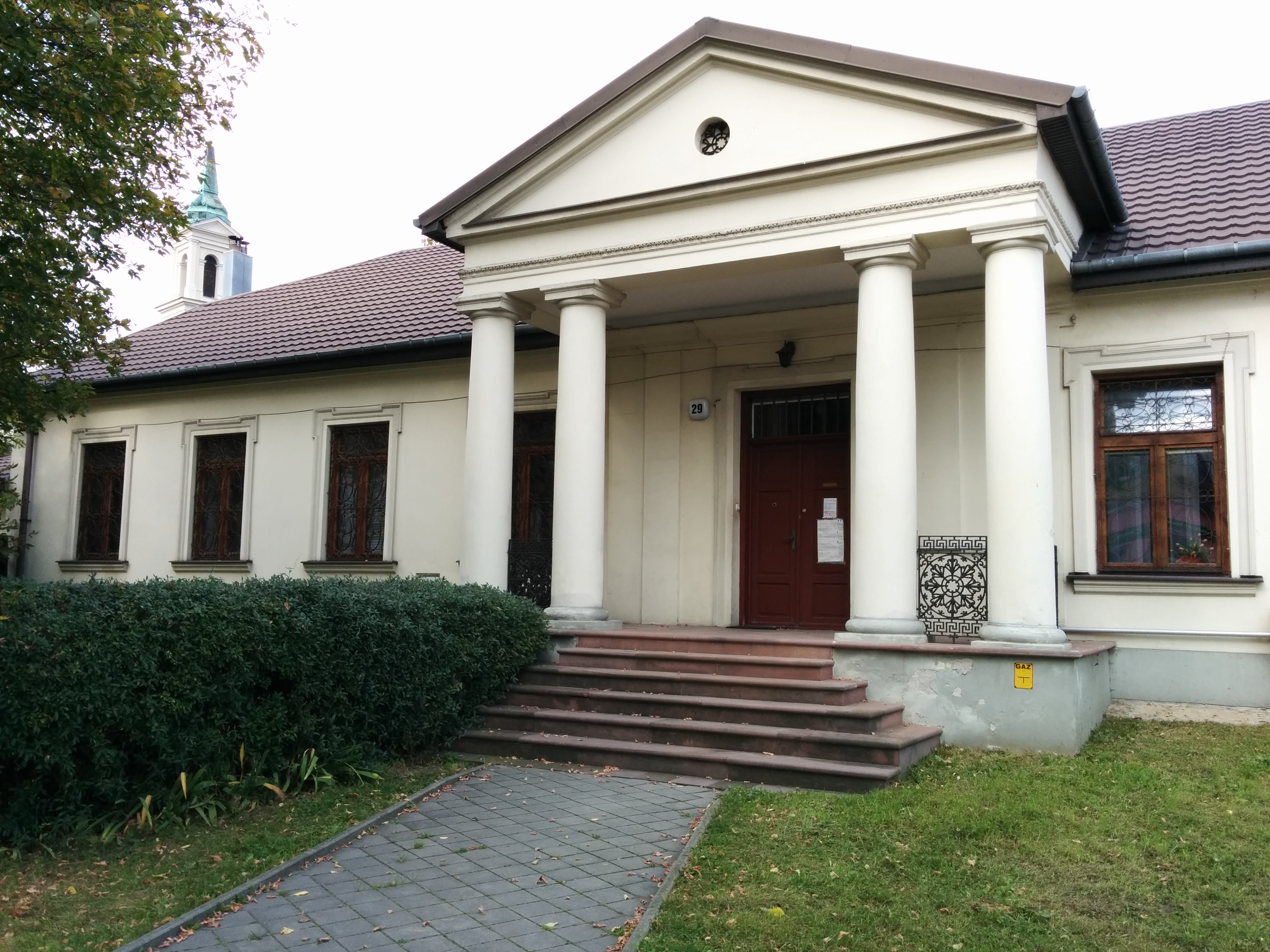 Kielce, dworek, obecnie biblioteka, 1853 r.